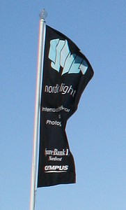 Nordic Light flagg på Piren.